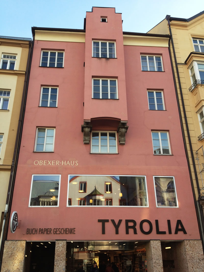 Geburtshaus von Diana Budisavljević mit der Aufschrift OBEXER-HAUS in der berühmten Maria-Theresien-Straße in Innsbruck This media shows the remarkable cultural object in the Austrian state of Tyrol listed by the Tyrolean Art Cadastre with the ID 116116. (on tirisMaps, pdf, more images on Commons, Wikidata)